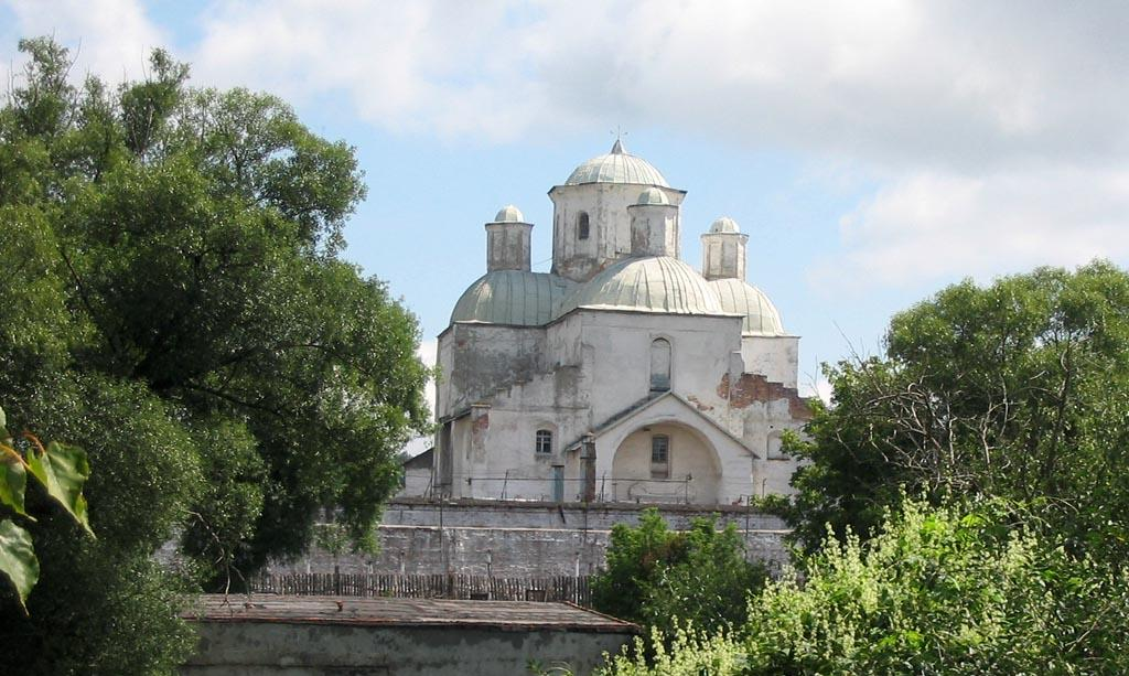 Гамаліївський монастир